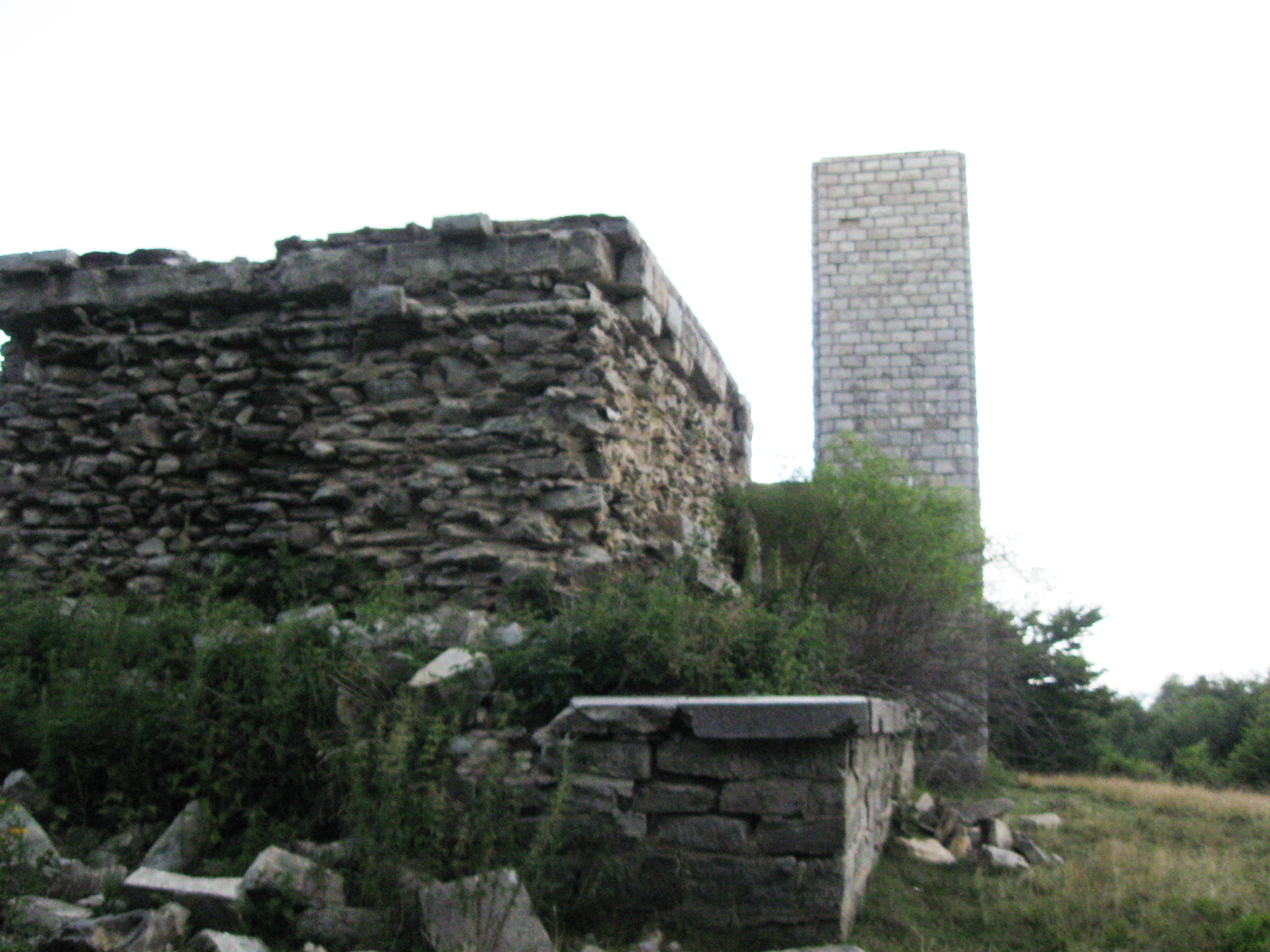 Snimak: Radosav Stojanović